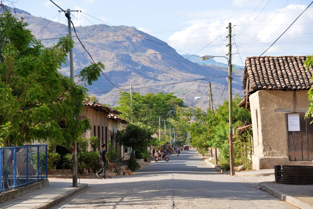 Calle en San Juan de Limay, NIcaragua.